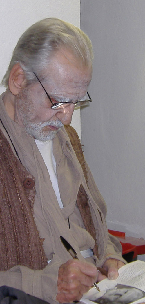 Giulio Bosetti actor